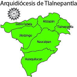 MAPA DE MUNICIPIOS DE LA ARQUIDIOCESIS DE TLALNEPANTLA